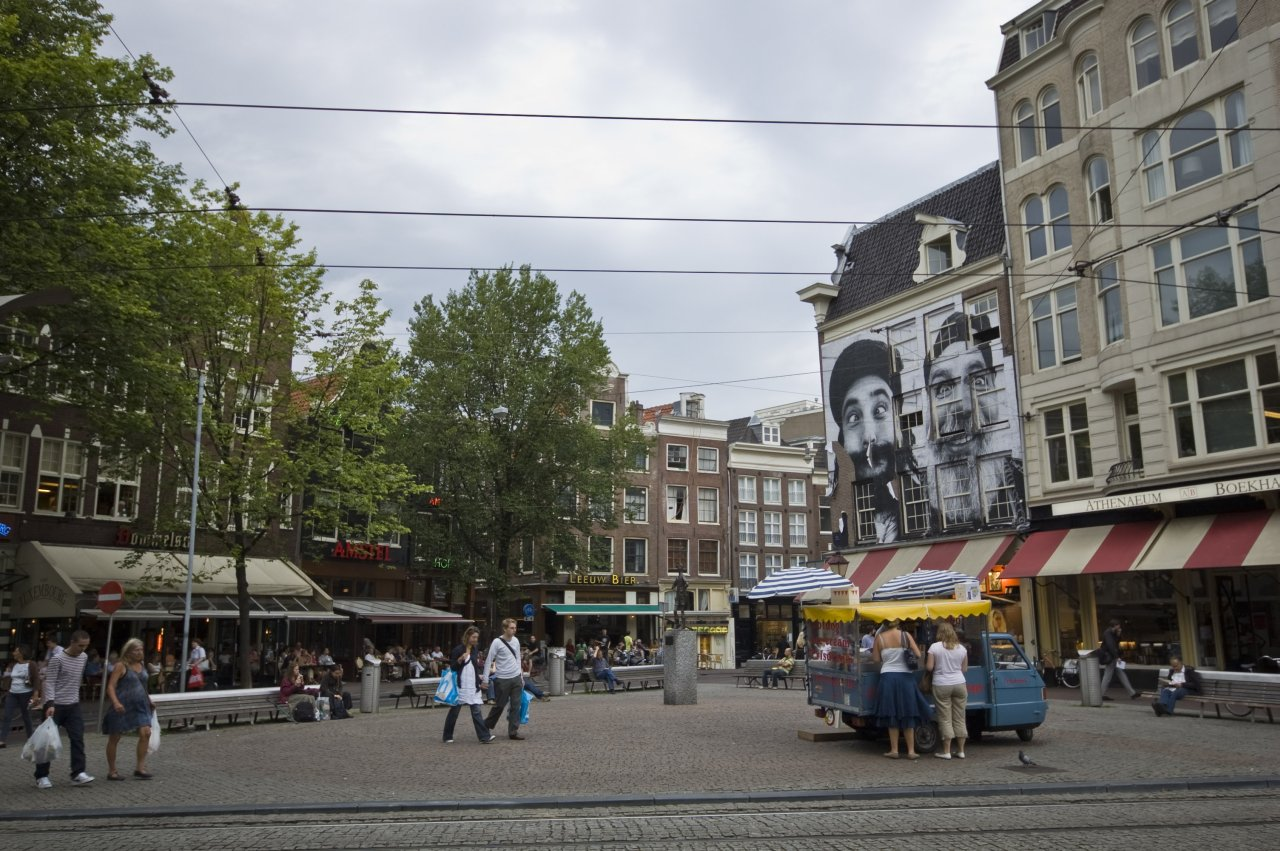 Image of Spui (Amsterdam).